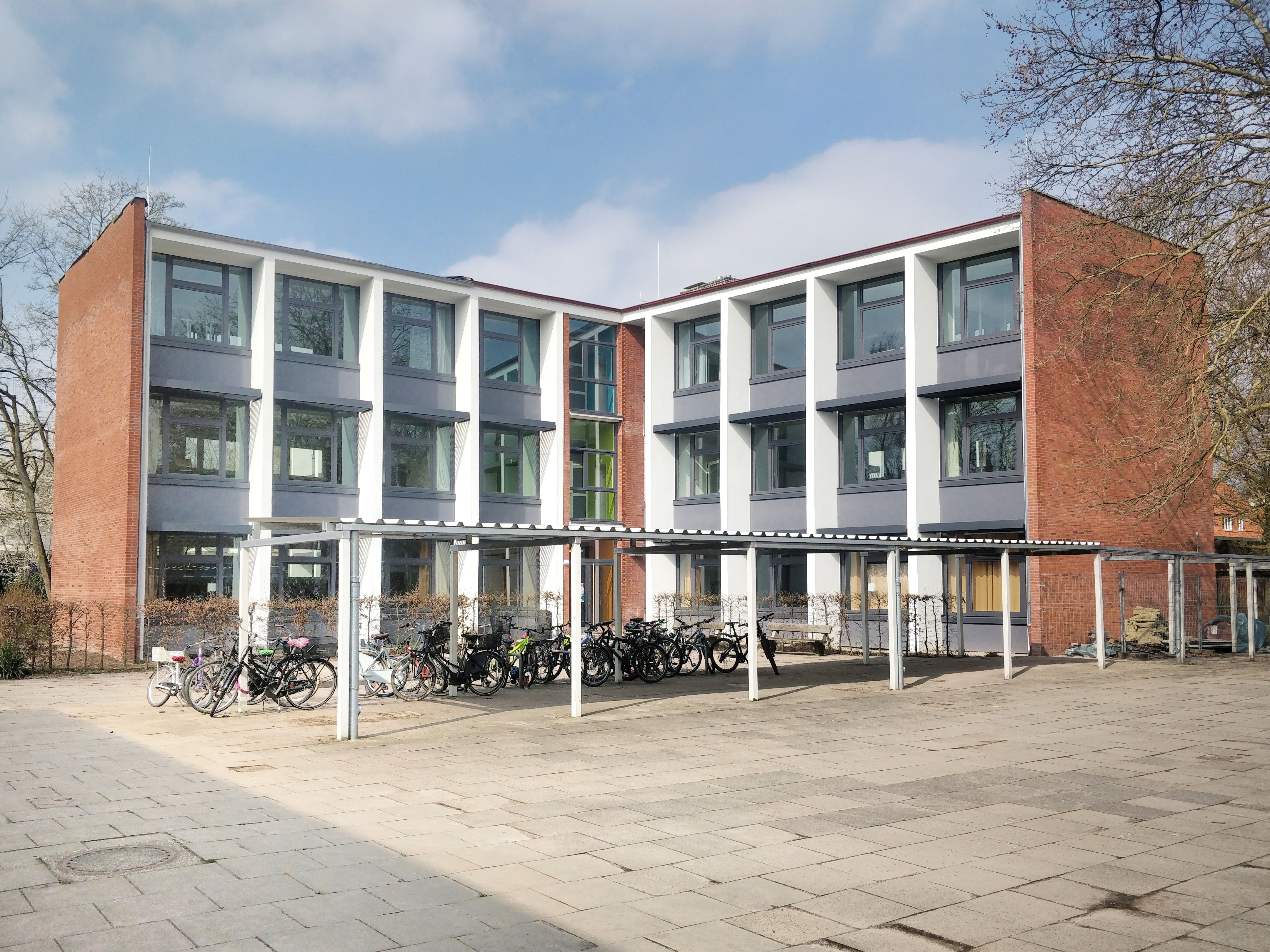 Süd- und Ostflügel des renovierten Kreuzbaus; davor Fahrradabstellanlage und Laubengang.